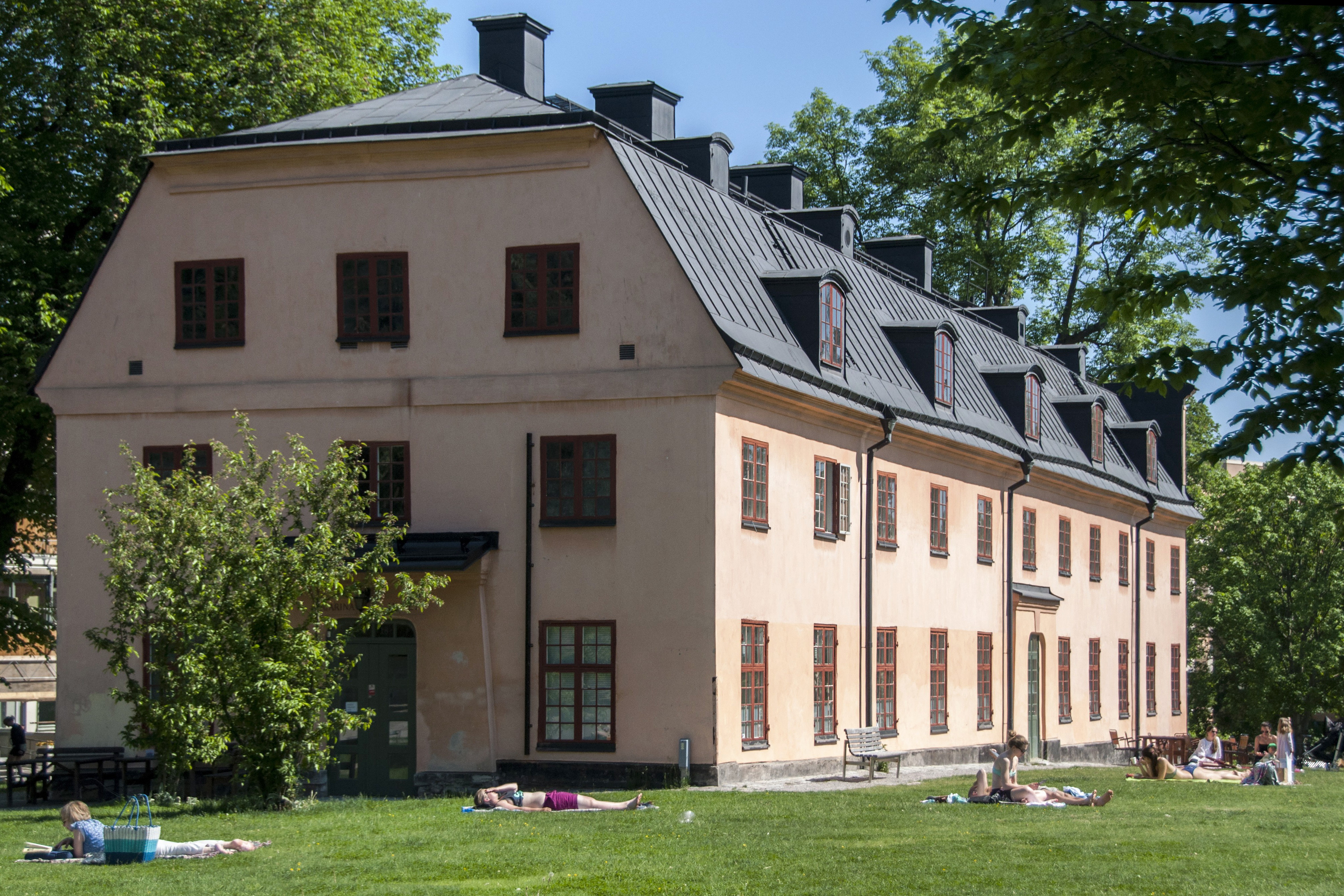 Katarinahuset, Sabbatsberg, Eastmansvägen 35- 37 Nybyggnadsår 1765 - 1767 osignerade ritningar, byggherre Fattighusdirektionen. Ursprungligen uppfört som värdshus för gästande vid Sabbatsbergs Surbrunn. Från 1880 fattighus för fattighjonen inom Katarina församling.